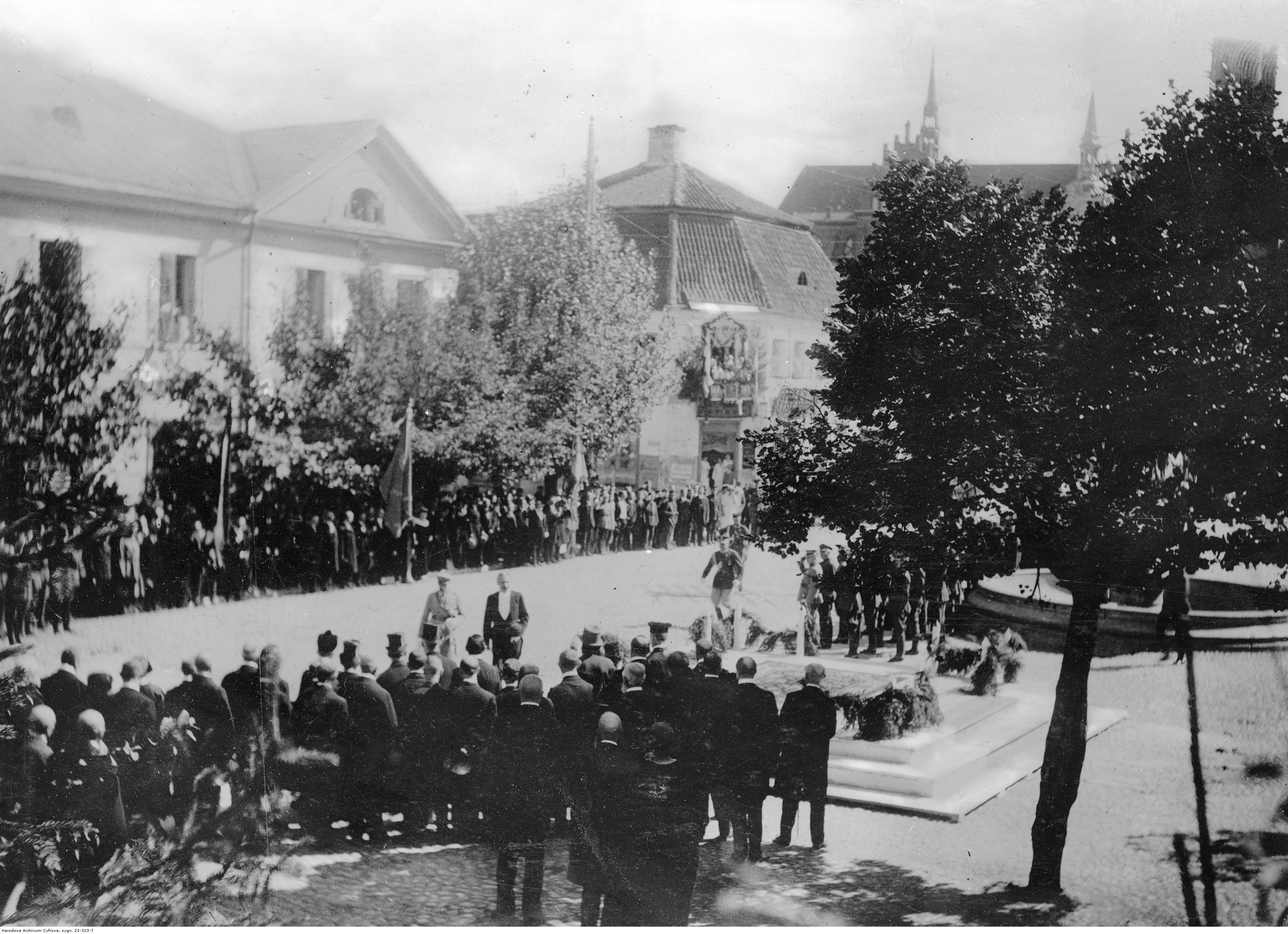 Uroczystości na Rynku Kościuszki. W centrum kadru widoczni: marszałek Józef Piłsudski i prezes Rady Miejskiej w Białymstoku Feliks Filipowicz.